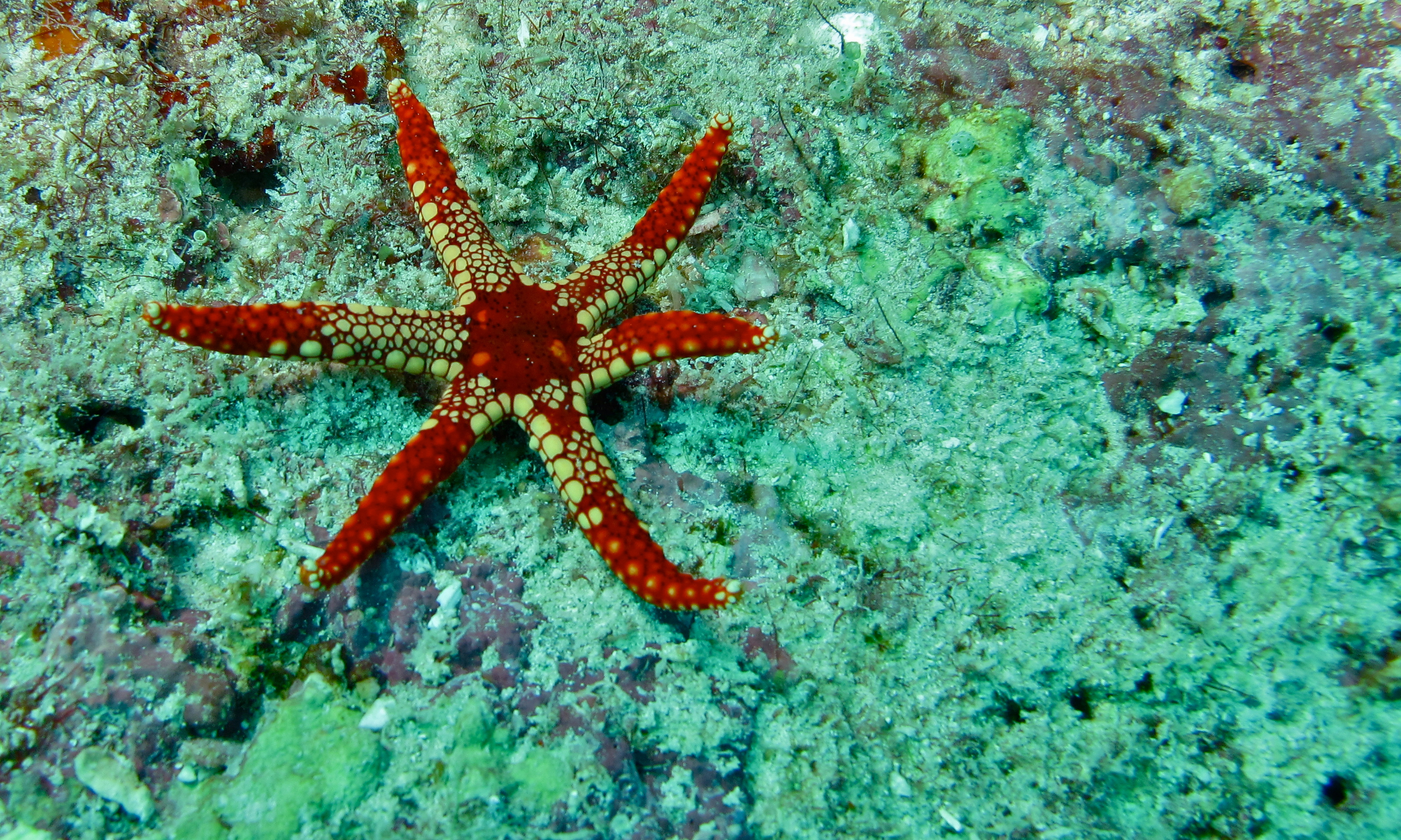 Paradise III, Mabul, Sabah, MALAYSIA